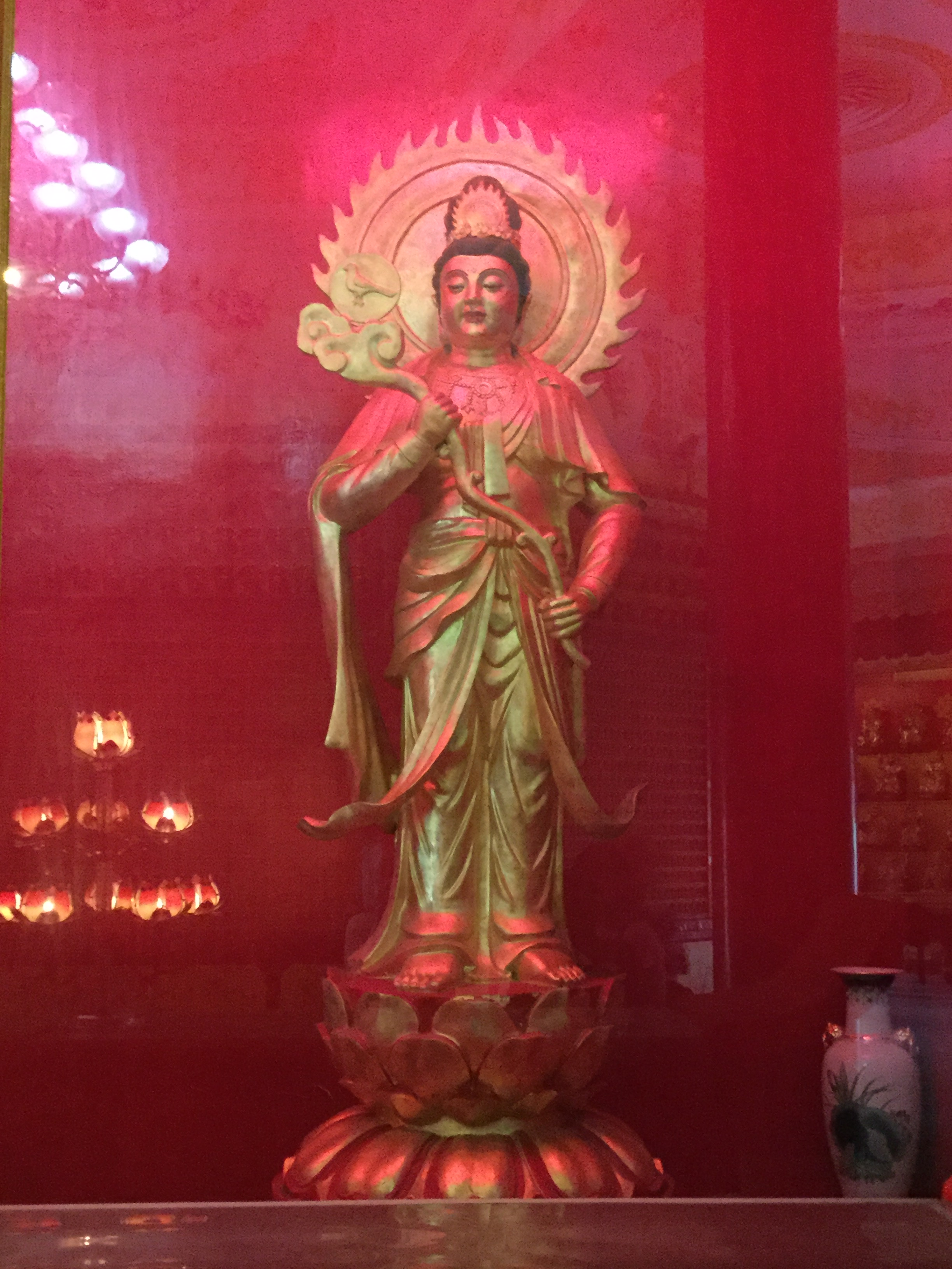 日光菩萨，汕头天坛花园